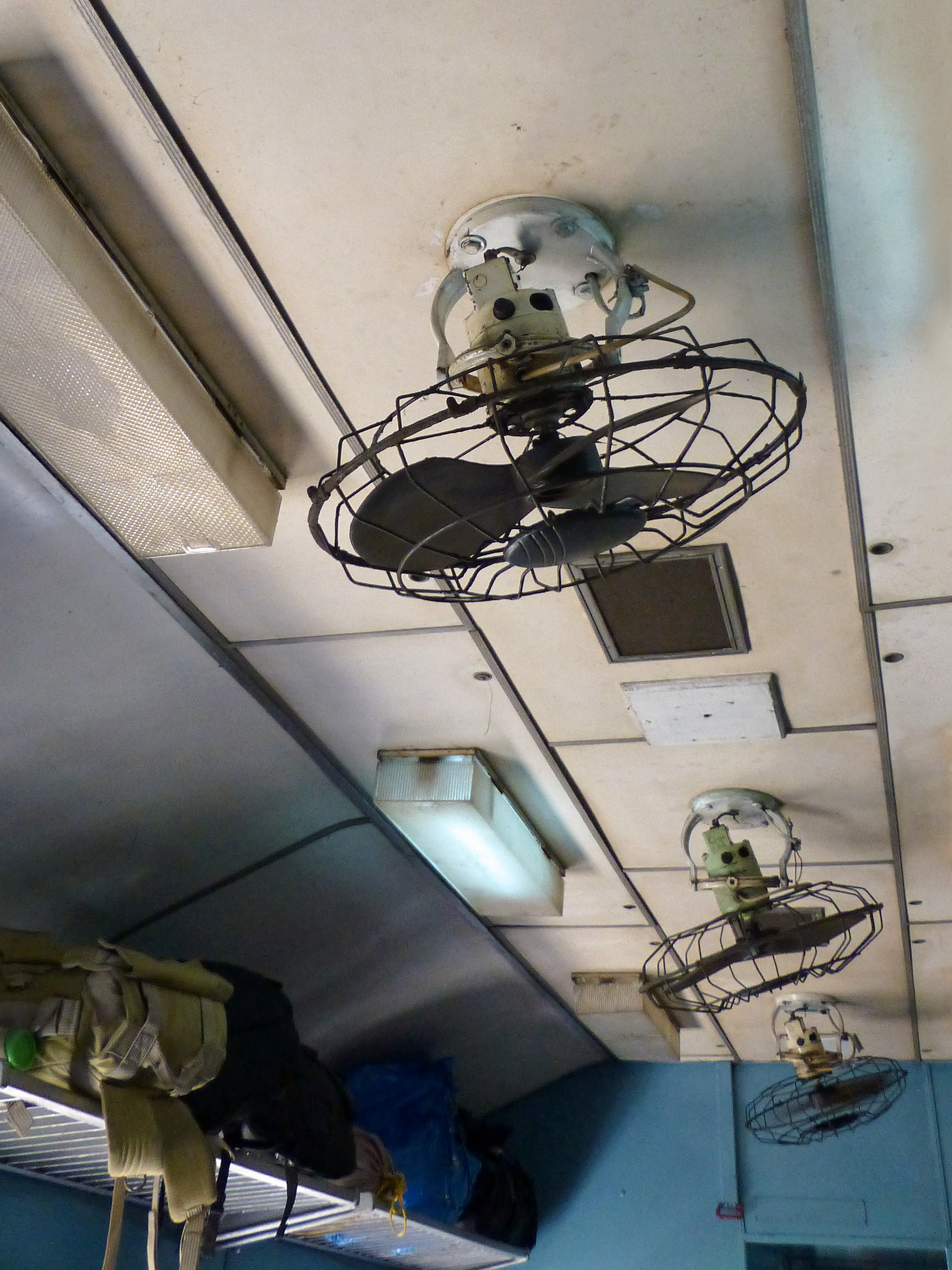 Ventilateurs de train (Sri Lanka)